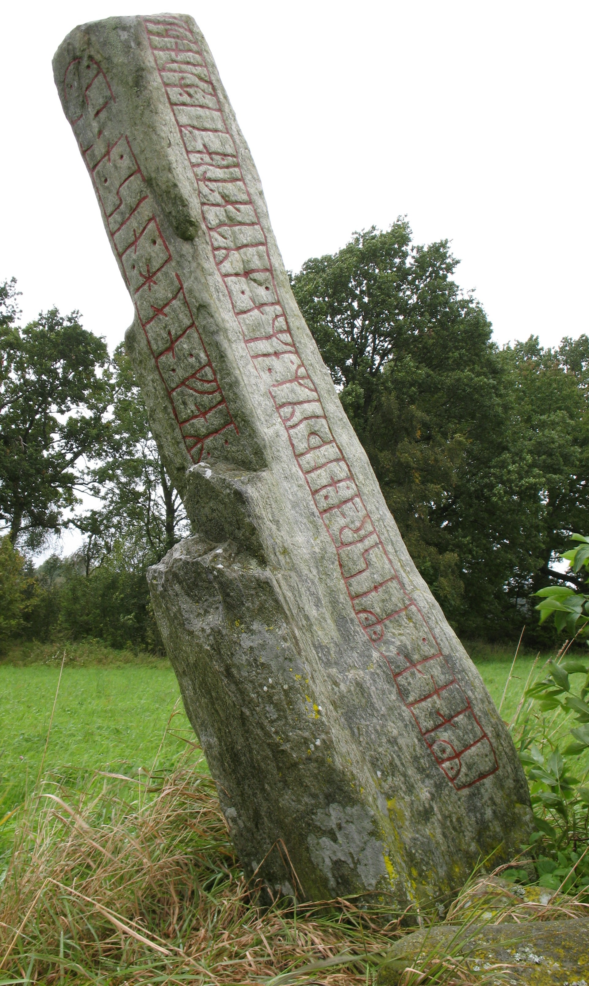 Runstenen Sm 5 i Transjö, Hjortsberga socken, Alvesta.